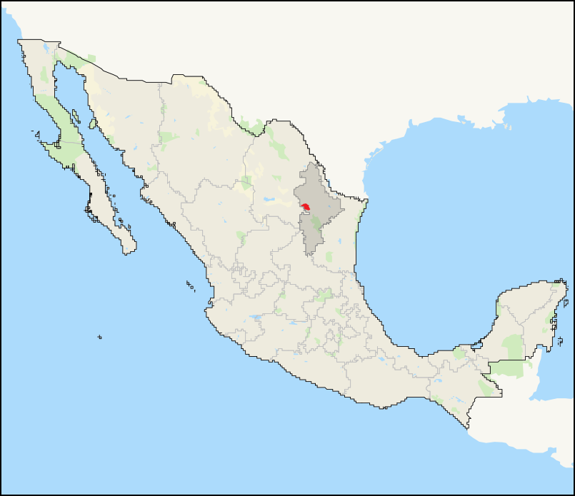 Mapa del distrito electoral federal 1 de Nuevo León ubicado en México